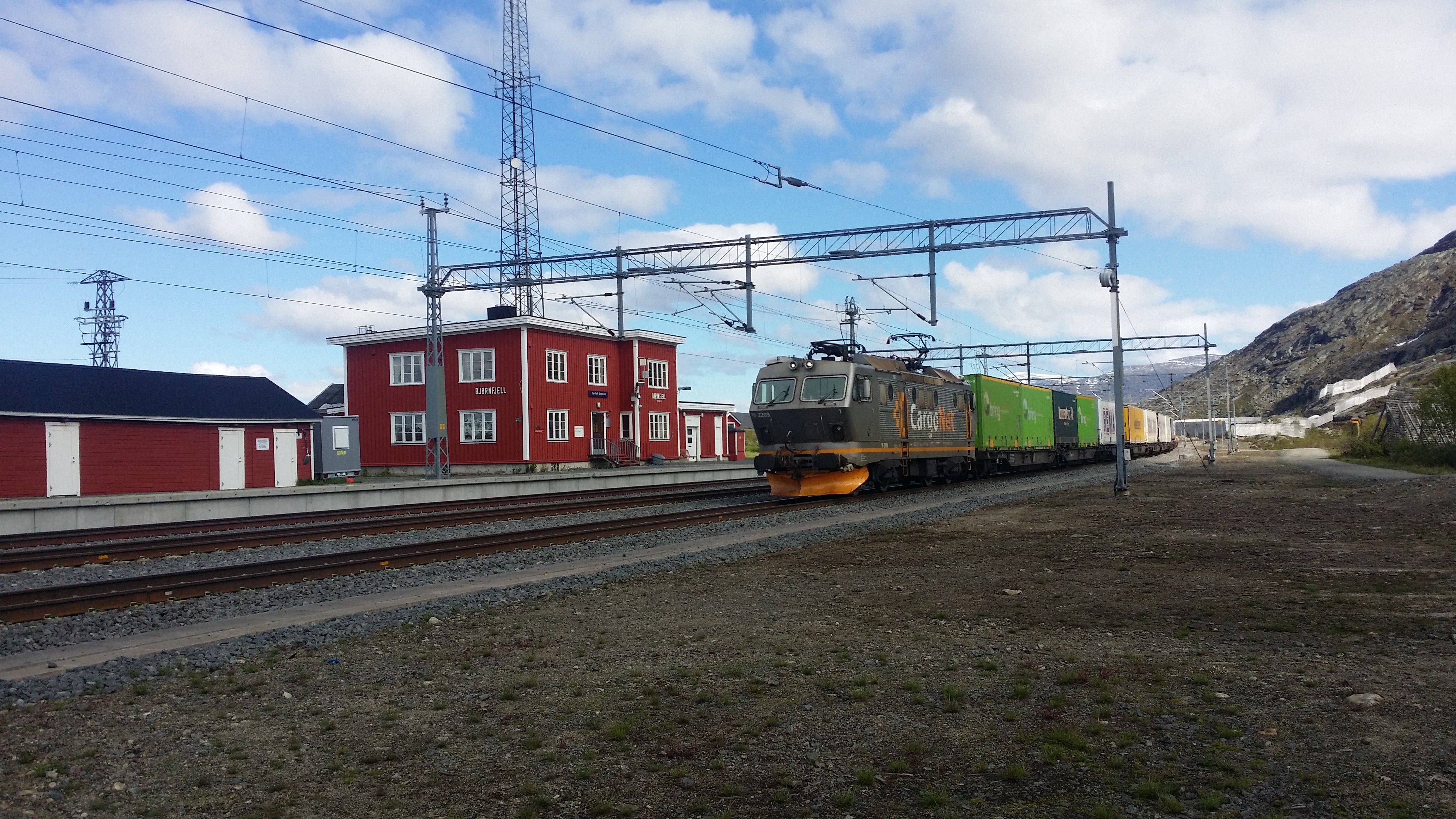 ARE-godstog Oslo-Narvik passerer Bjørnfjell stasjon på Ofotbanen.